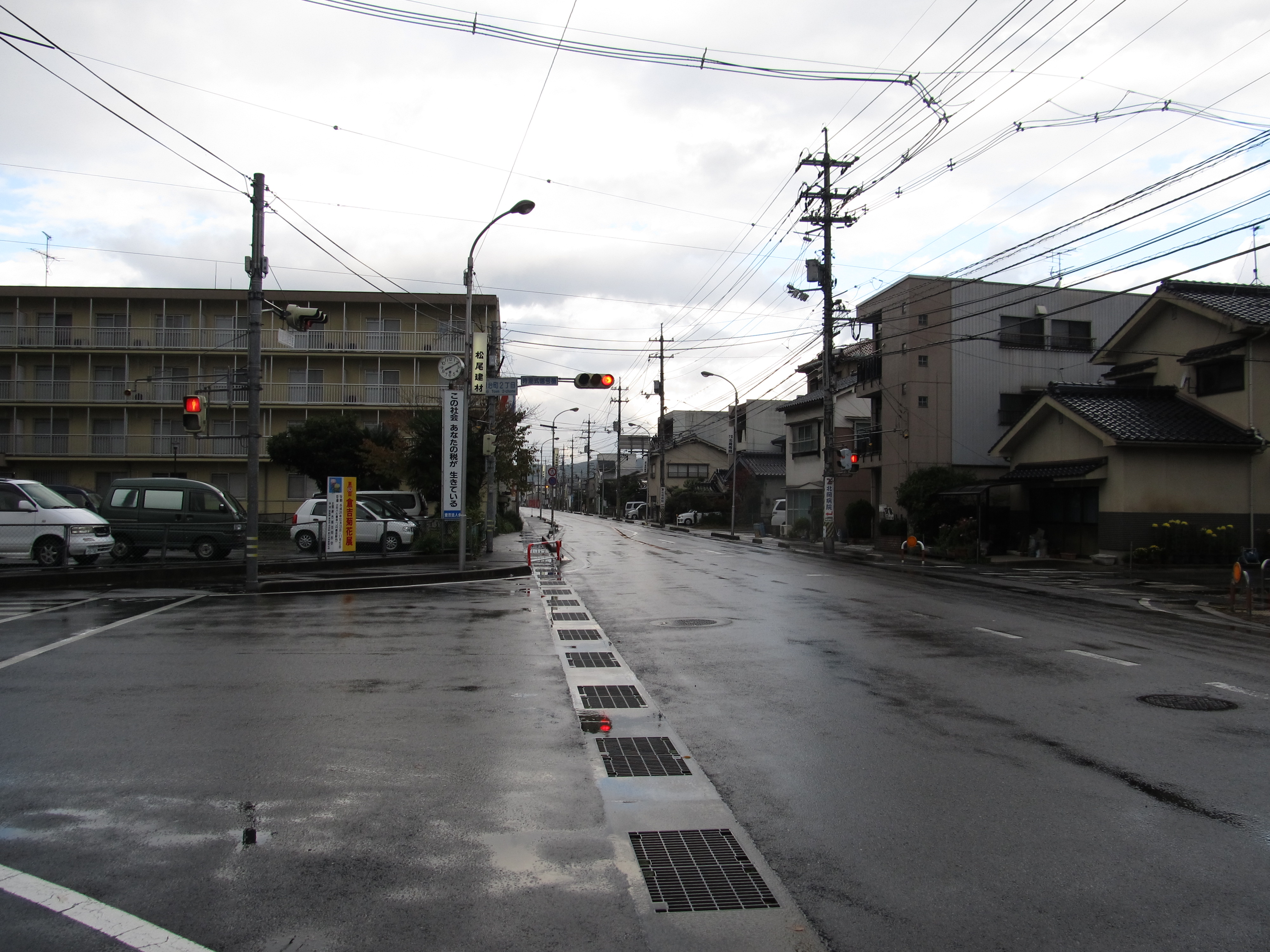 鳥取県道161号倉吉江北線（美作街道、旧国道313号）。倉吉市の明治町2丁目交差点にて撮影。